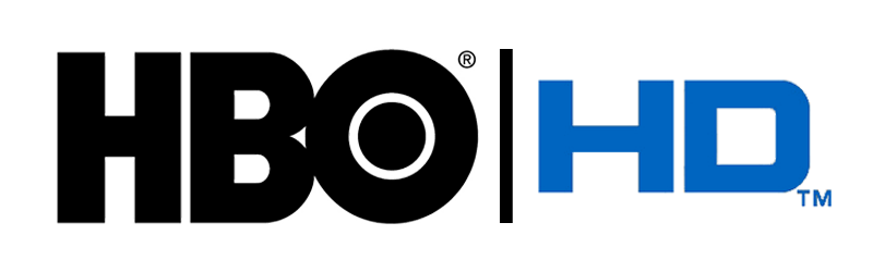 Logotipo do canal HBO HD.